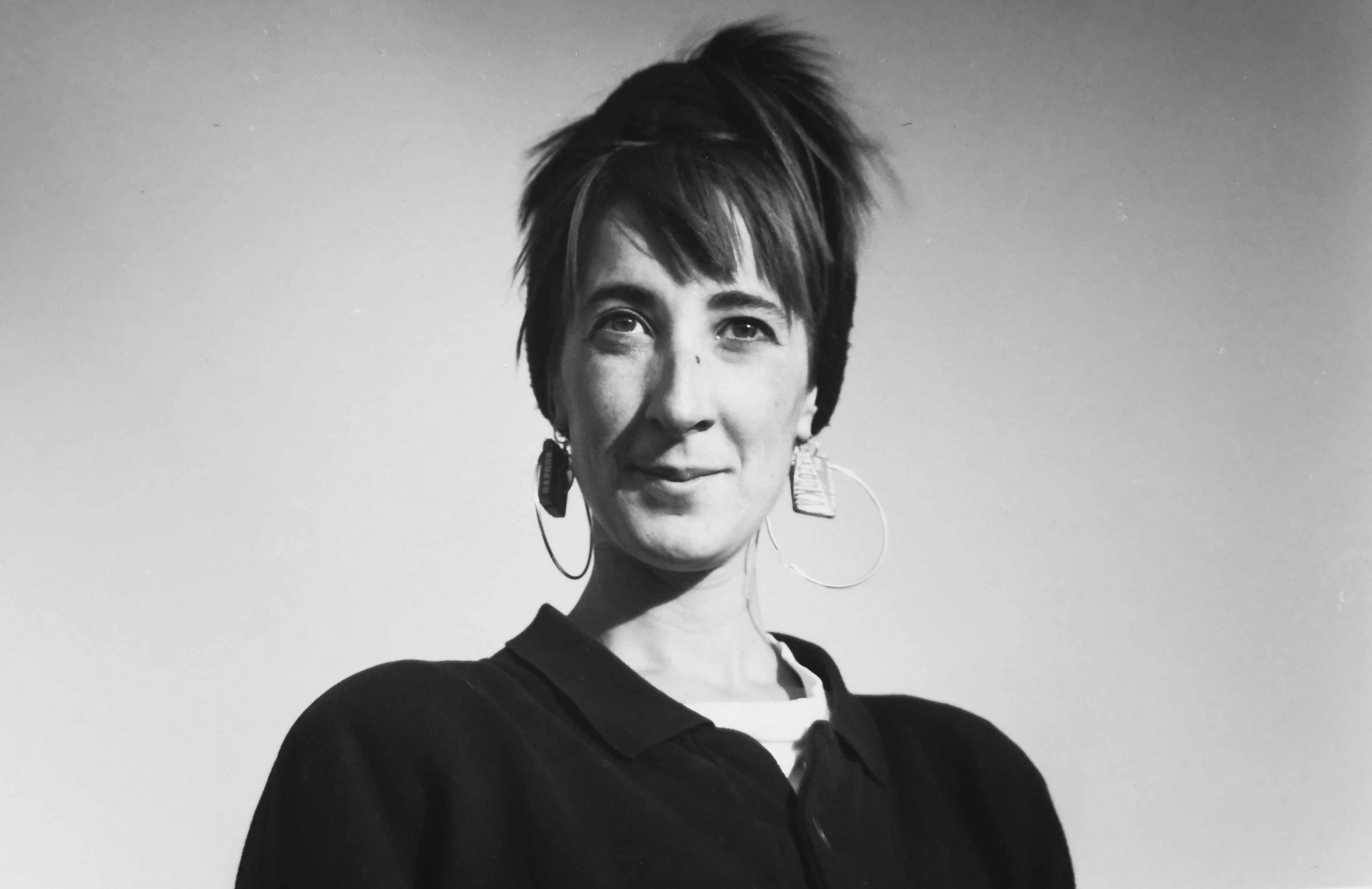 Clelia Sedda negli anni '90